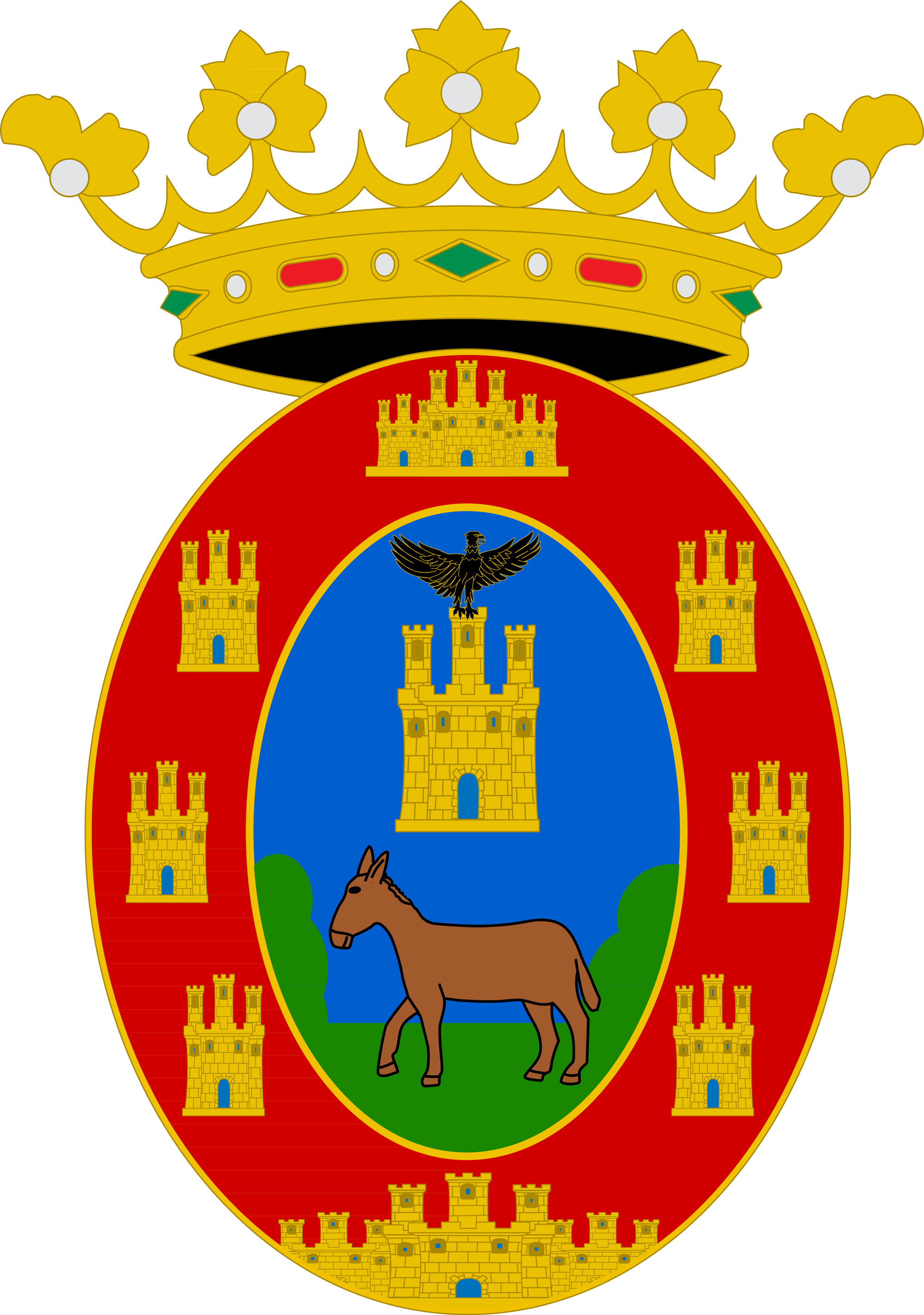 Escudo de Mula, en Murcia (España)